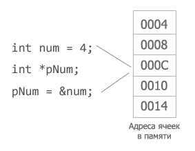 переменная num объявляется и инициализируется. После чего объявляется переменная–указатель, указывающаяя на null. Затем указателю присваевается адрес переменной num. Таким образом обе переменные ссылаются на одно и то же место в памяти. Однако, в последней строке этого кода допущена существенная ошибка - присвоить указателю значение переменной следовало бы так: ptr = &num. У автора же *ptr = &num, - что означает: "записать в переменную, на которую ссылается указатель ptr адрес переменной num" - картинку следует исправить!